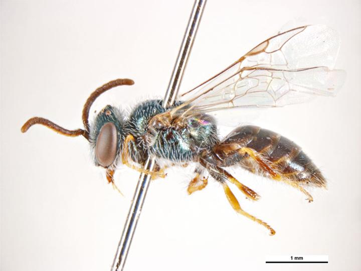 Euhesma spinola female